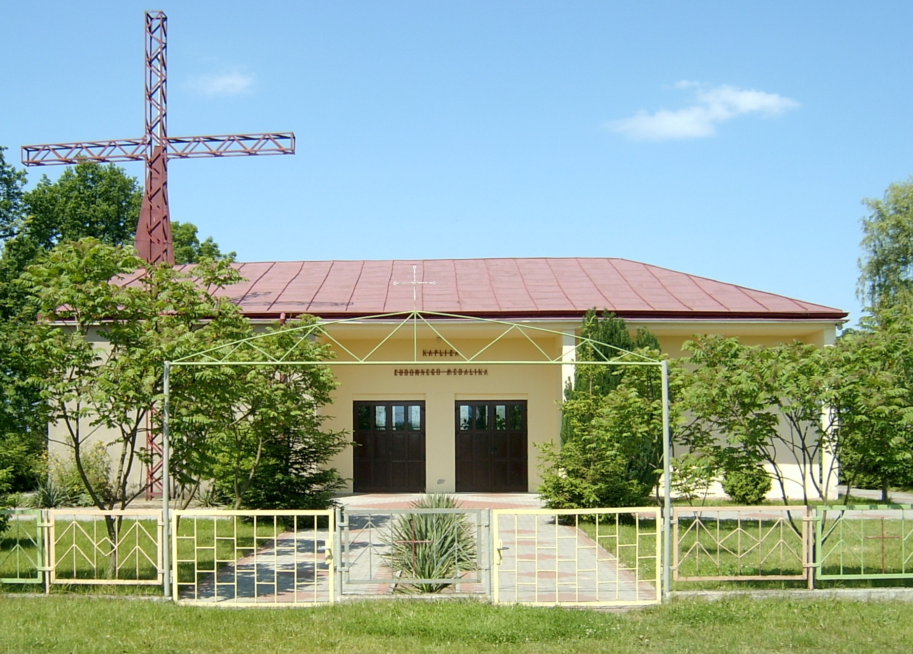 Kapelle in Słubice